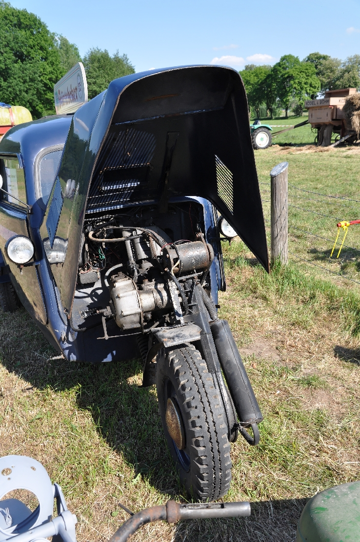 Bilder der Oldtimerausstellung Hemmoor-Westersode 2012-05